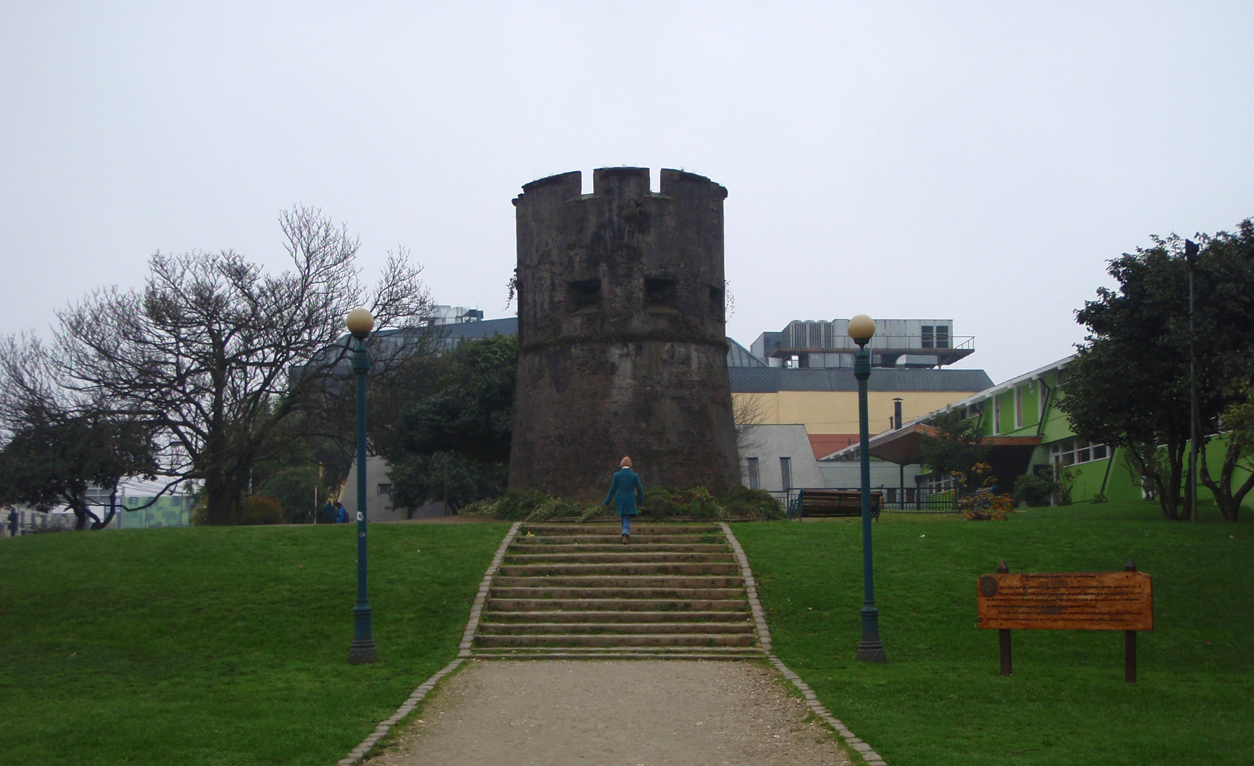 Torreón Picarte, Valdivia. This is a photo of a national monument in Chile: 171